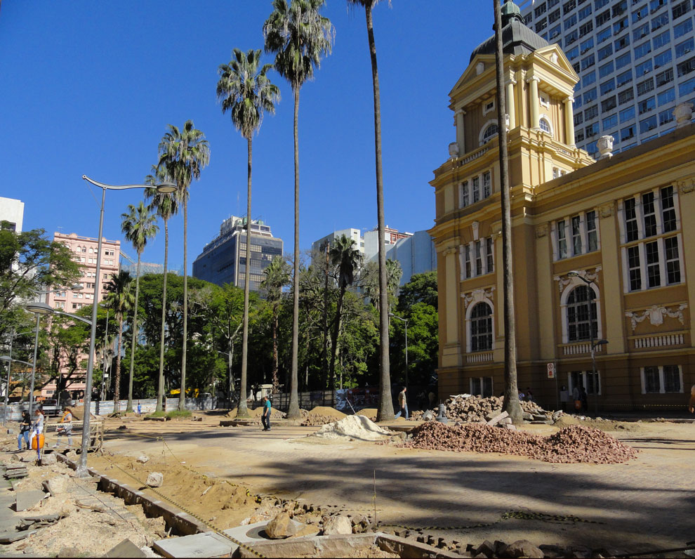 Obras de reforma da Praça da Alfândega e Avenida Sepúlveda